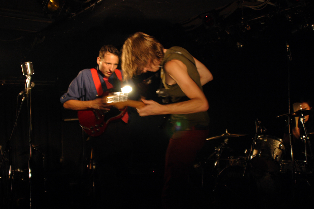 crw_4014